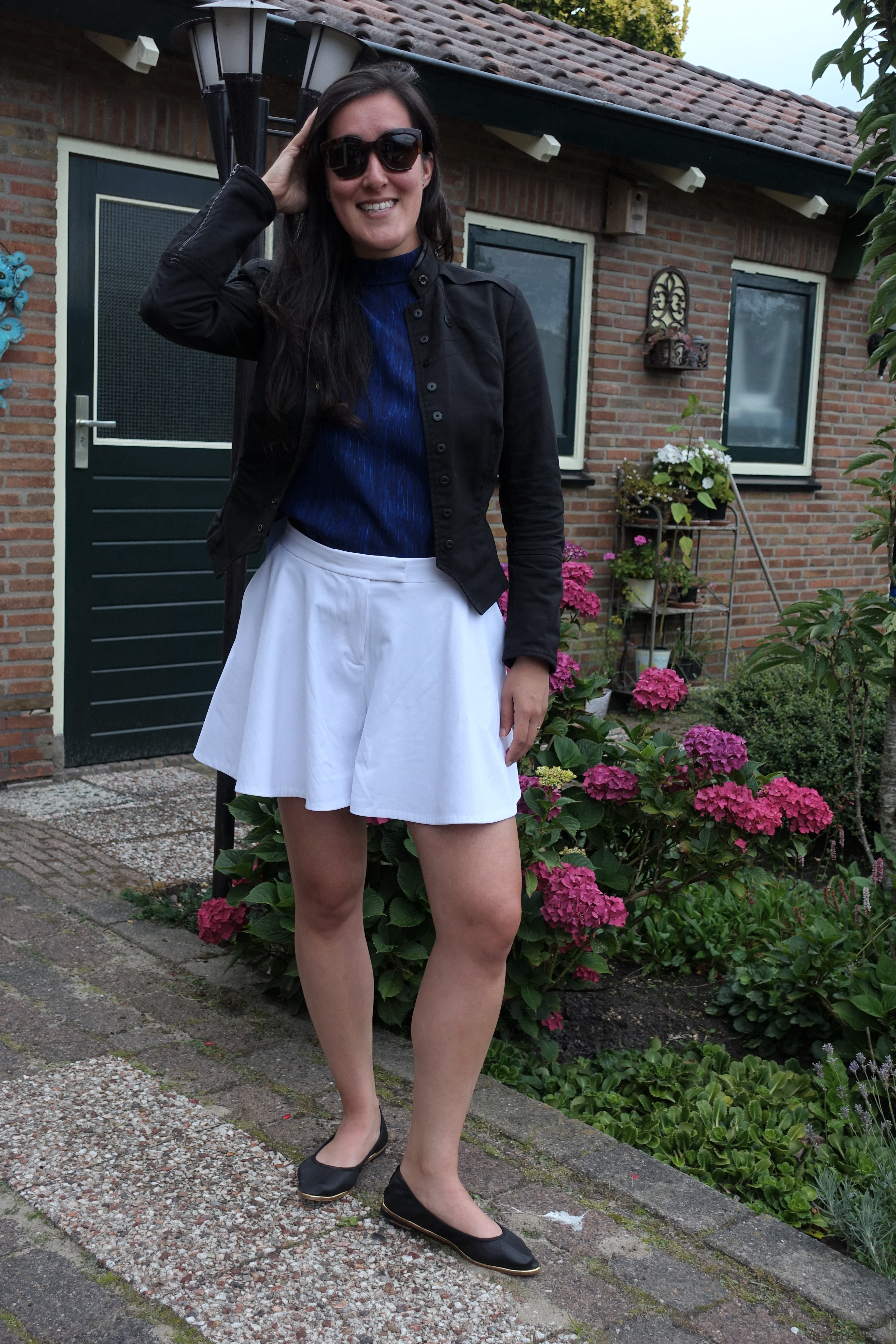 Broekrok van het merk Cos, 2017, gedragen door Vera Mekern. Gepubliceerd met haar toestemming.